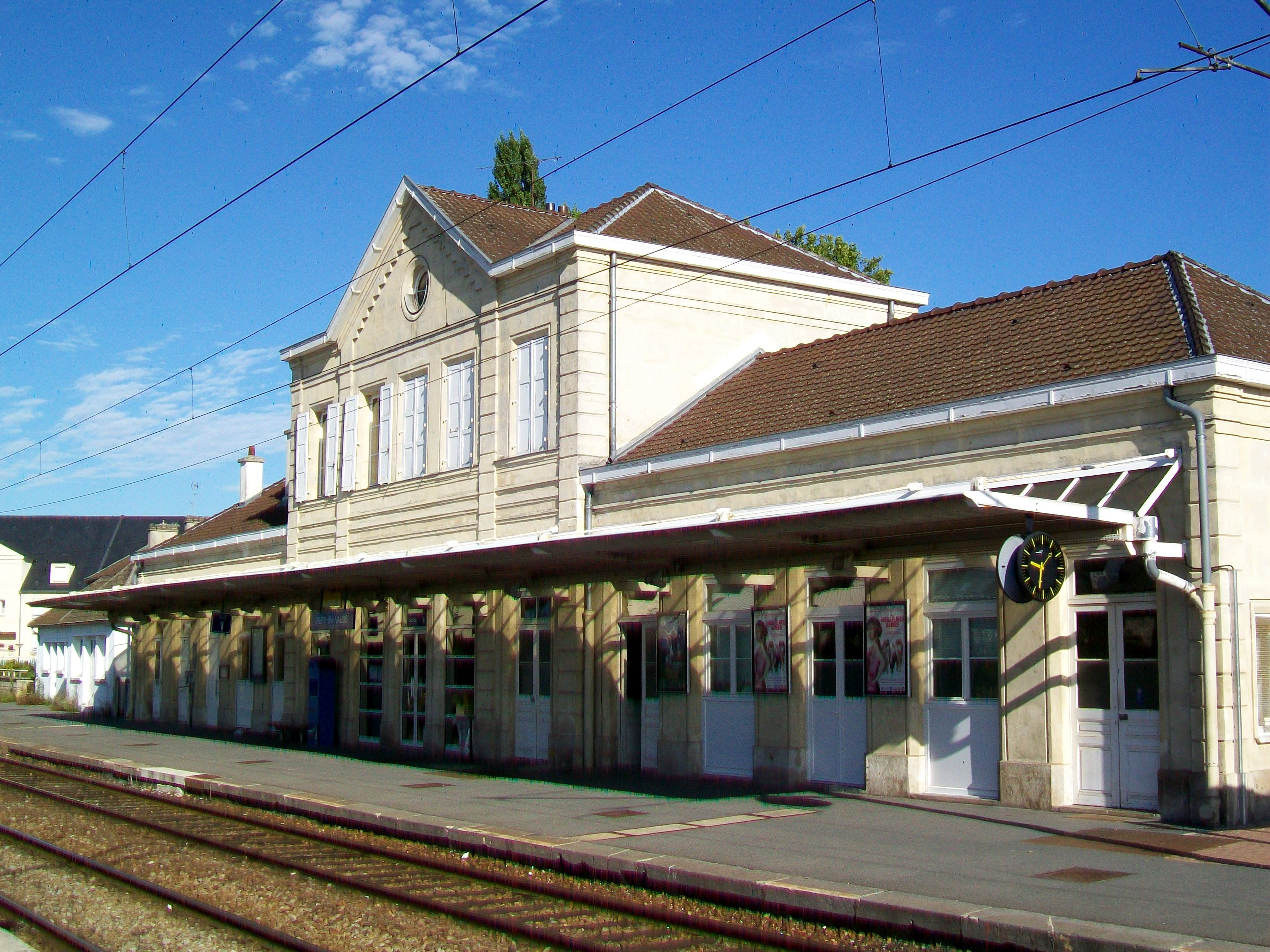 Le bâtiment voyageurs, côté voies.